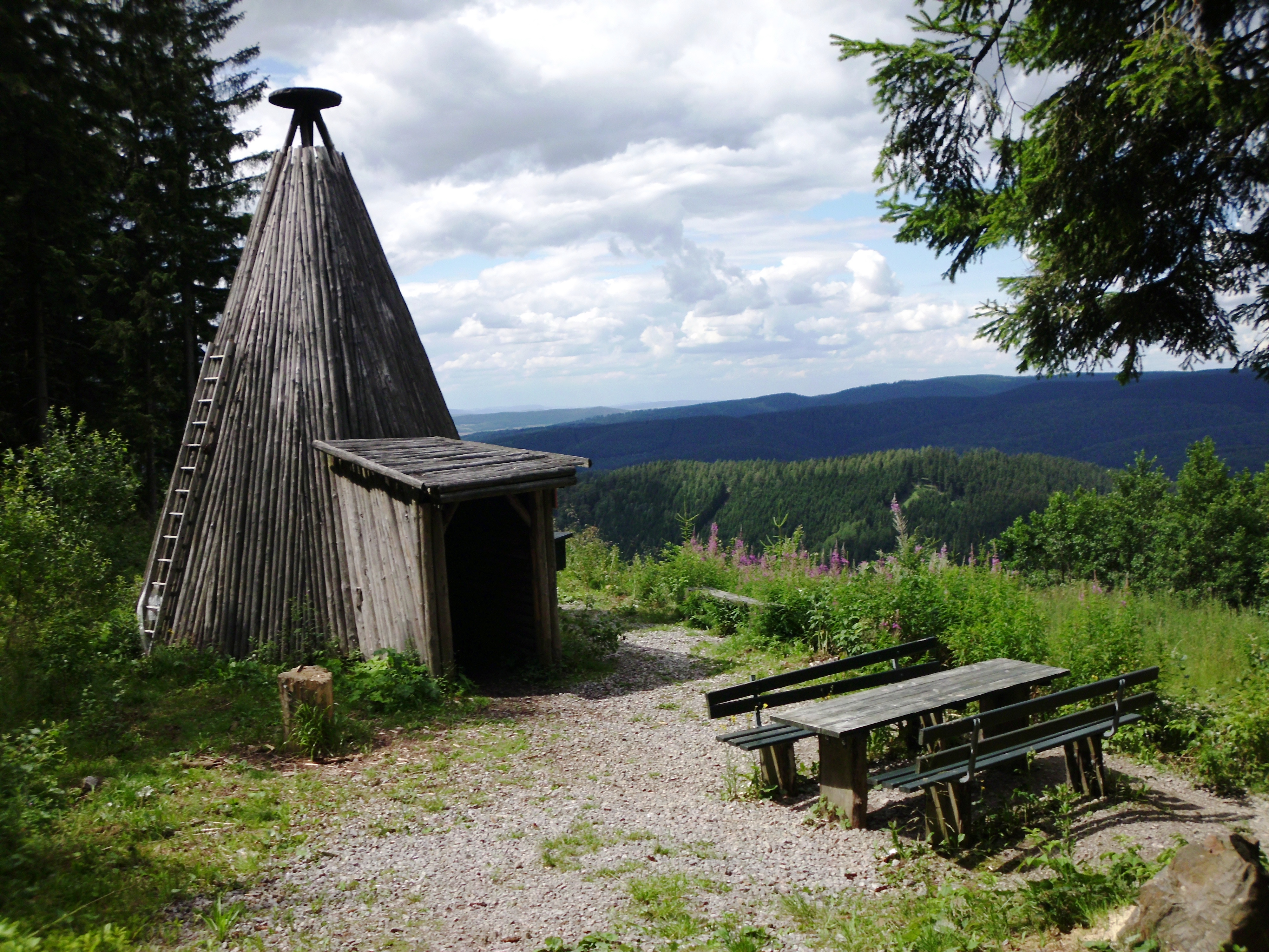 Köte am Schindelkopf bei Riefensbeek